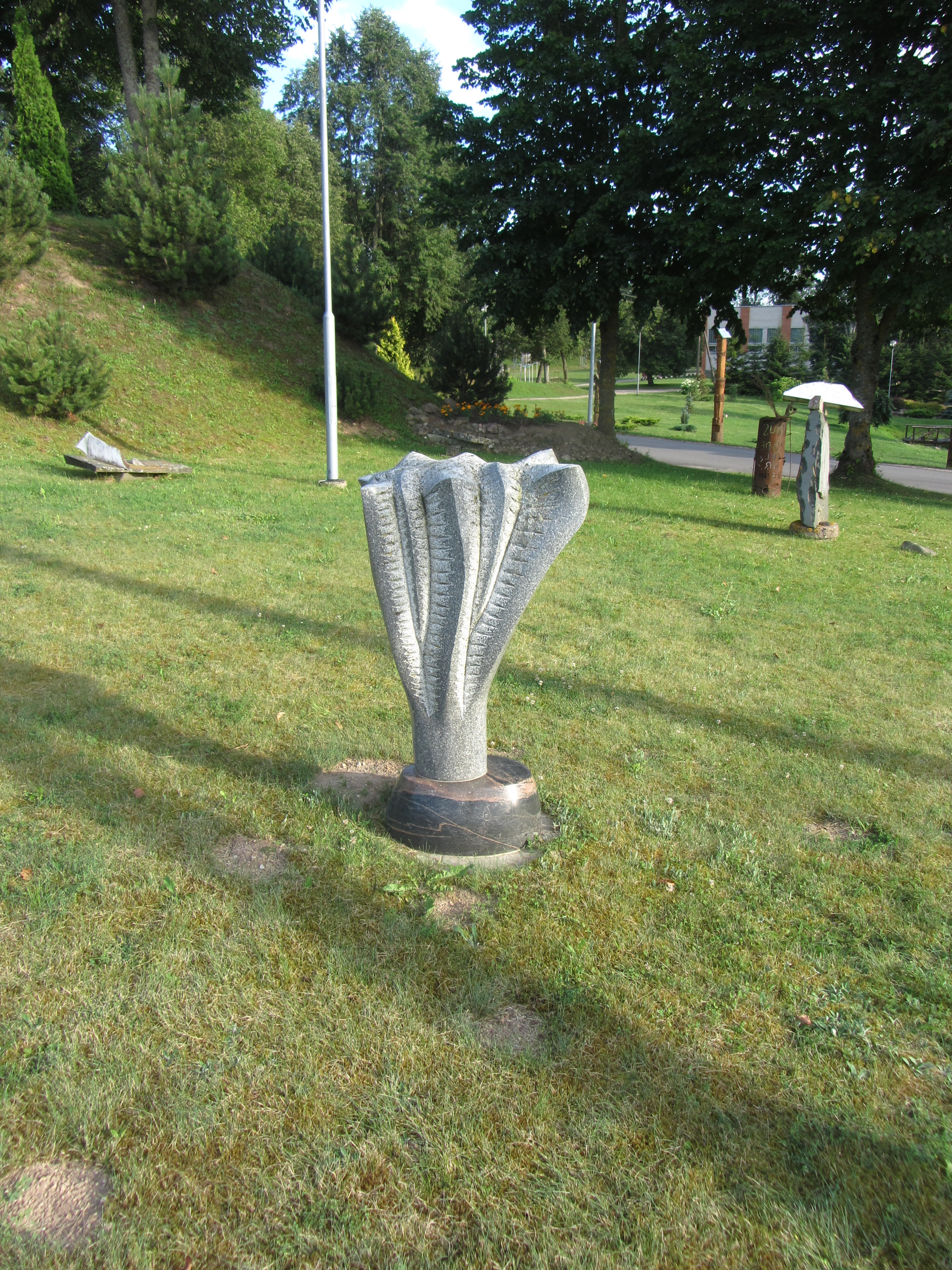 Kuktiškės, Lithuania